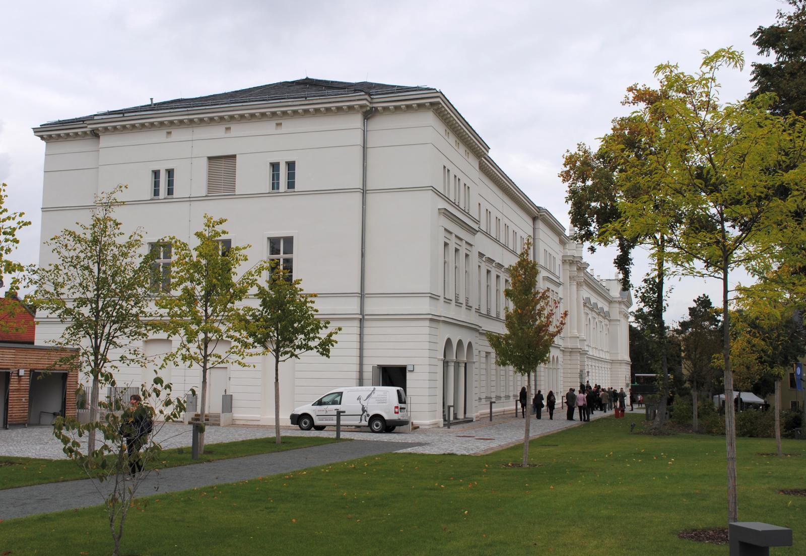 Leopoldina-Hauptgebäude Seitenansicht